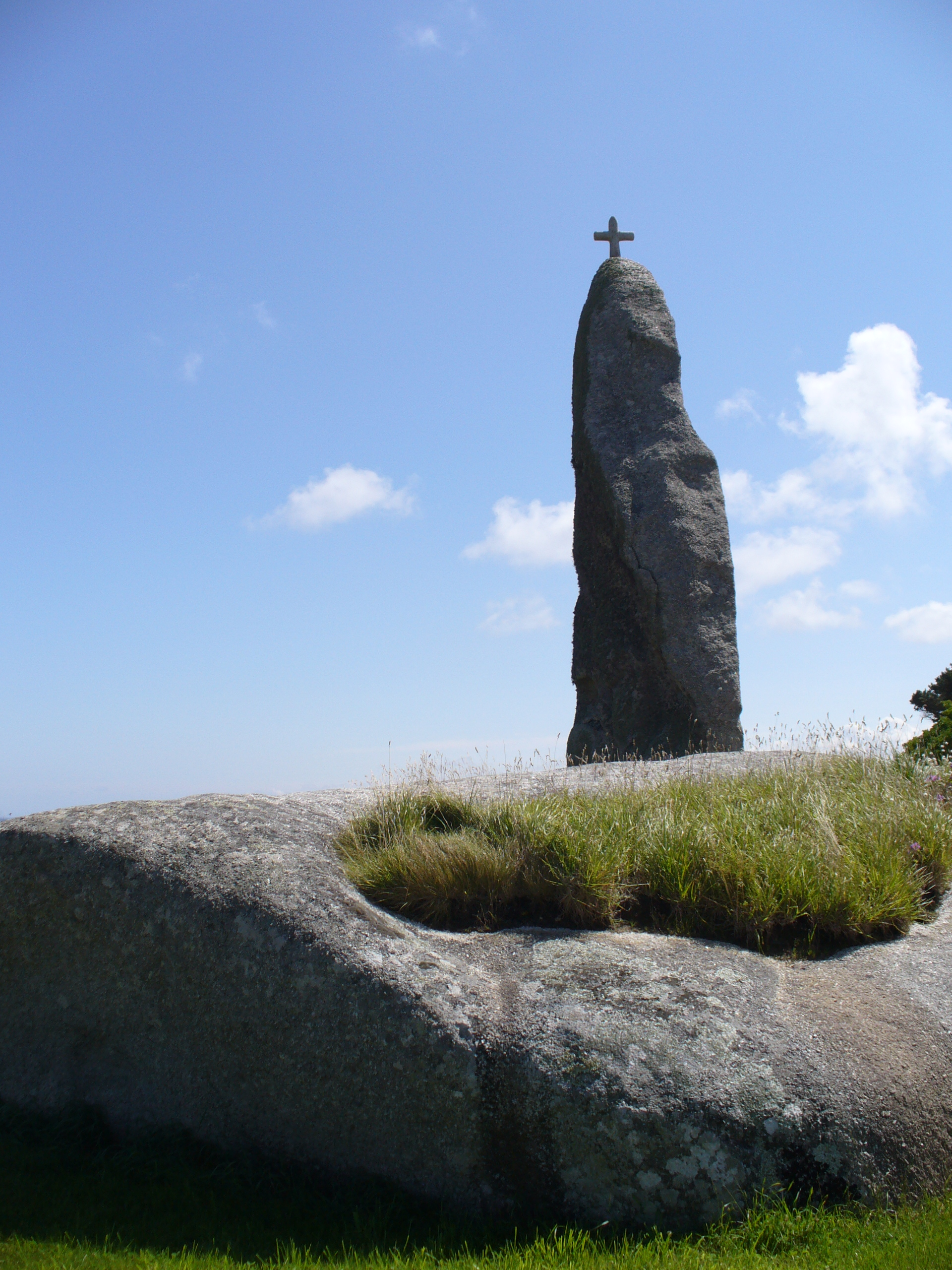 Der Menhir Men Marz ist mit einer Größe von 8,50 Meter und einem Gewicht von 80 Tonnen einer der vier höchsten Menhire Frankreichs. Das Kreuz an seiner Spitze als Zeichen seiner späteren Christianisierung. Brignogan-Plages, Finistère ,Côte des Légendes